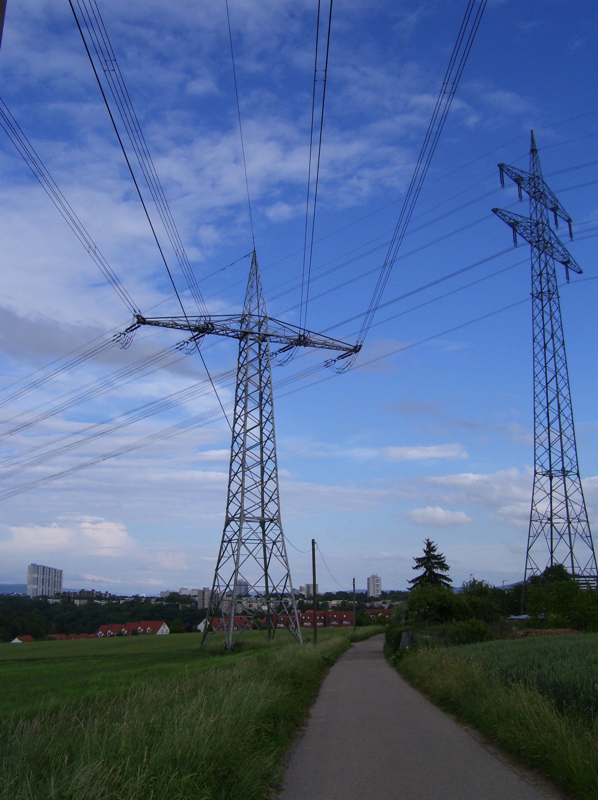 Mast der Bahnstromleitung Neckarwestheim/Bahnstromschaltwerk–Zentraleinspeisstelle Stuttgart-Zazenhausen. Neben der Bahnstromleitung GKN Neckarwestheim–Neckarwestheim/Bahnstromschaltwerk ist das eine der wenigen Bahnstromleitungen, die Viererbündel verwendet. Im Hintergrund ein Mast der 220-kV-Leitung Schaltwerk Neckarwestheim–Umspannwerk Stuttgart-Seewiesen der EnBW. Man beachte das girlandenförmig am Erdseil aufgehängte Luftkabel.